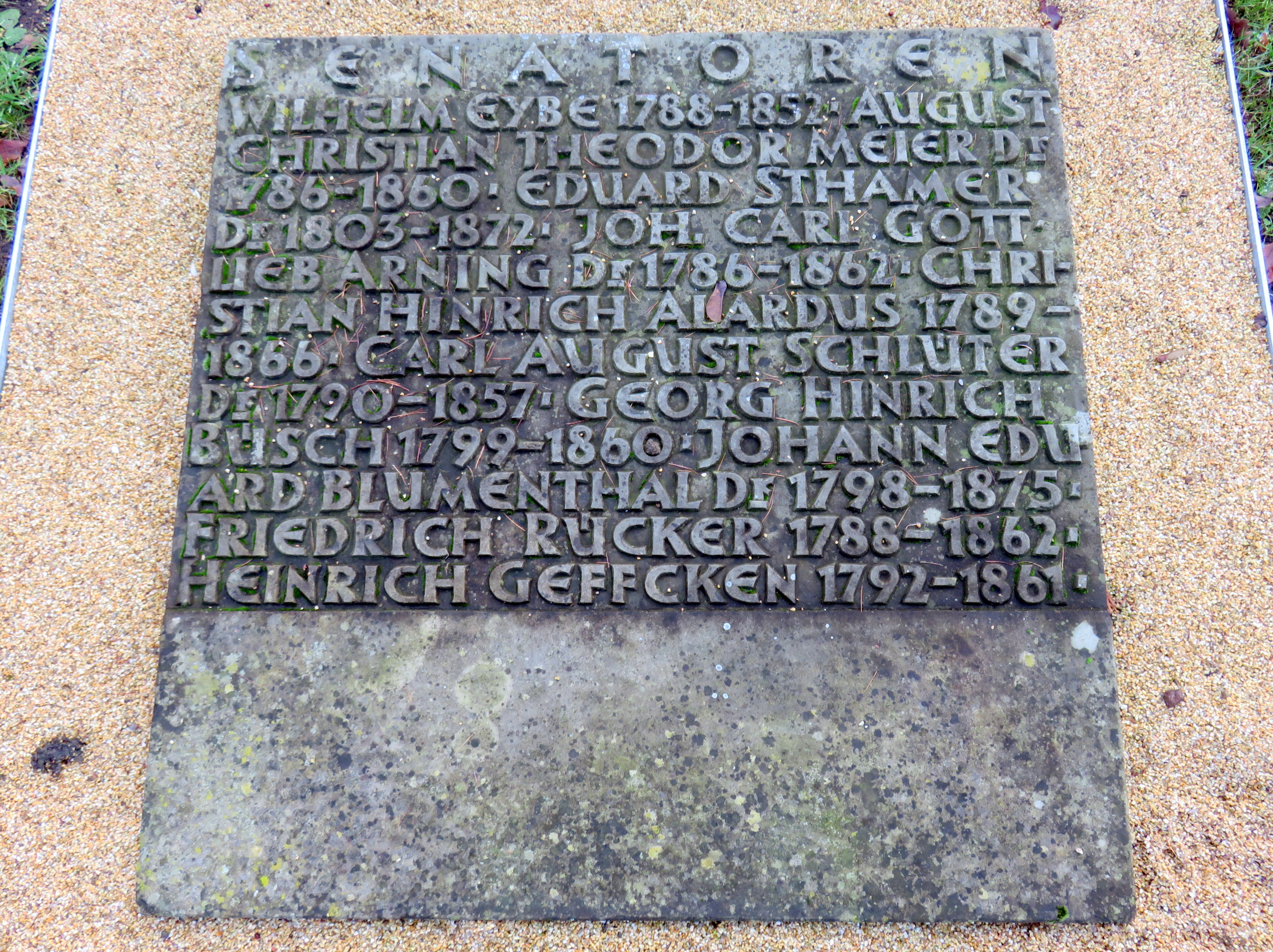 Sammelgrabmal Senatoren (III) im Bereich des Althamburgischen Gedächtnisfriedhofs auf dem Hamburger Friedhof Ohlsdorf zu Ehren von unter anderen Johann Carl Gottlieb Arning, Christian Heinrich Alardus, Heinrich Geffcken.